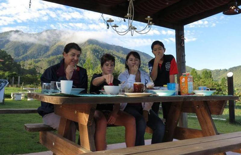 IMG_4853 copy